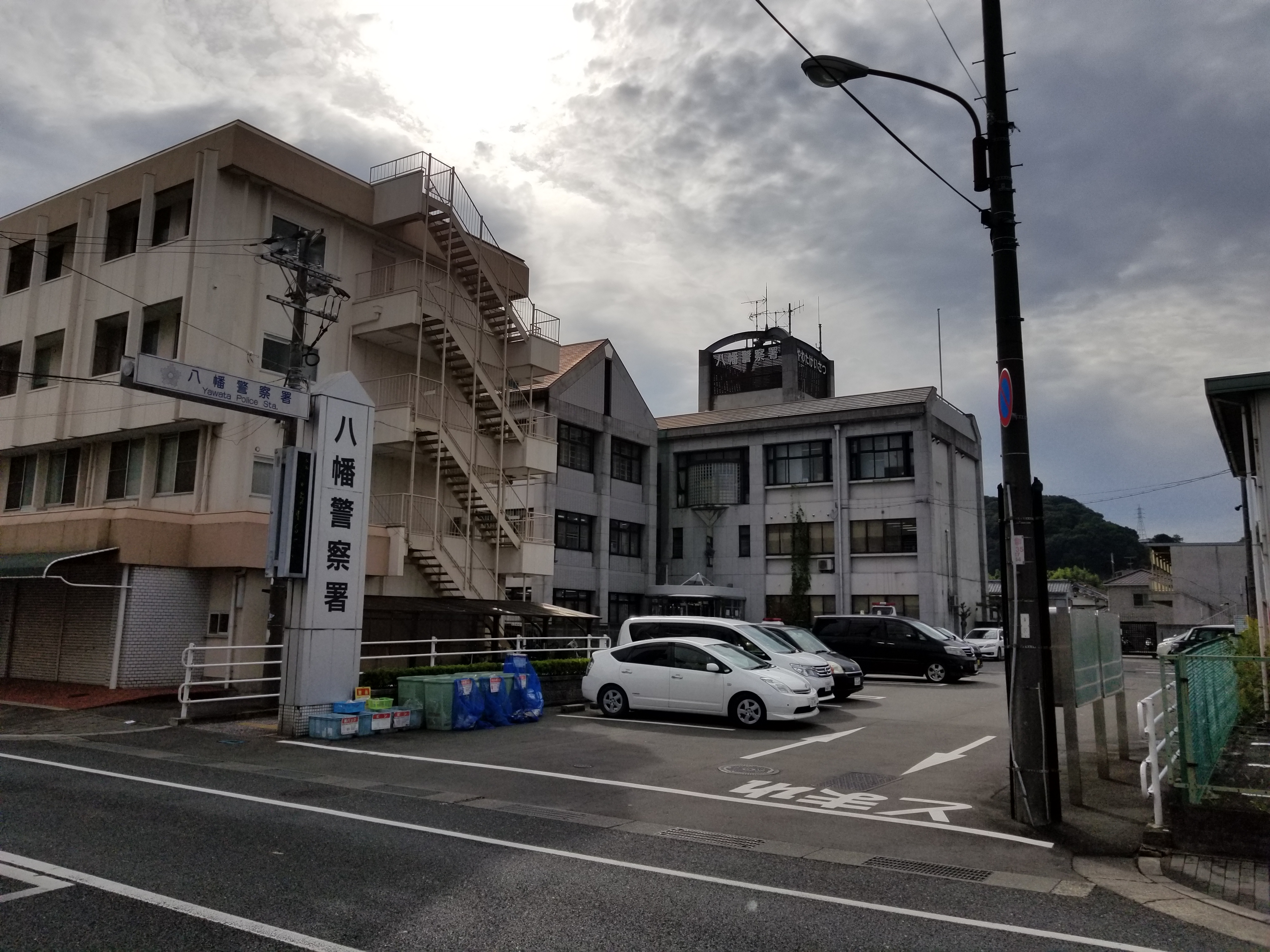 京都府八幡警察署